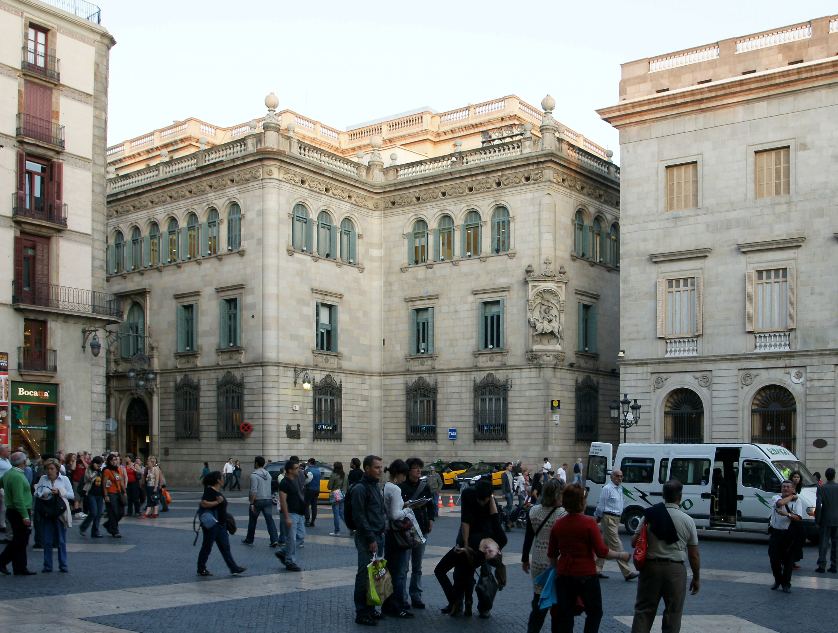 "Plaça de Sant Jaume" in Barcelona.